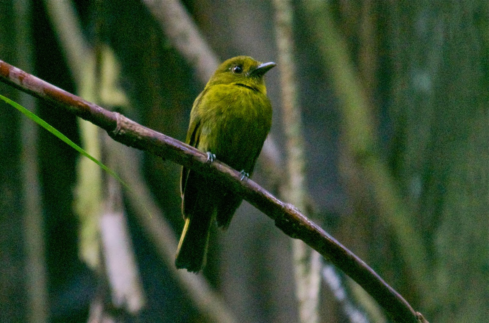 Sapayoa aenigma, Nusagandi, Panama